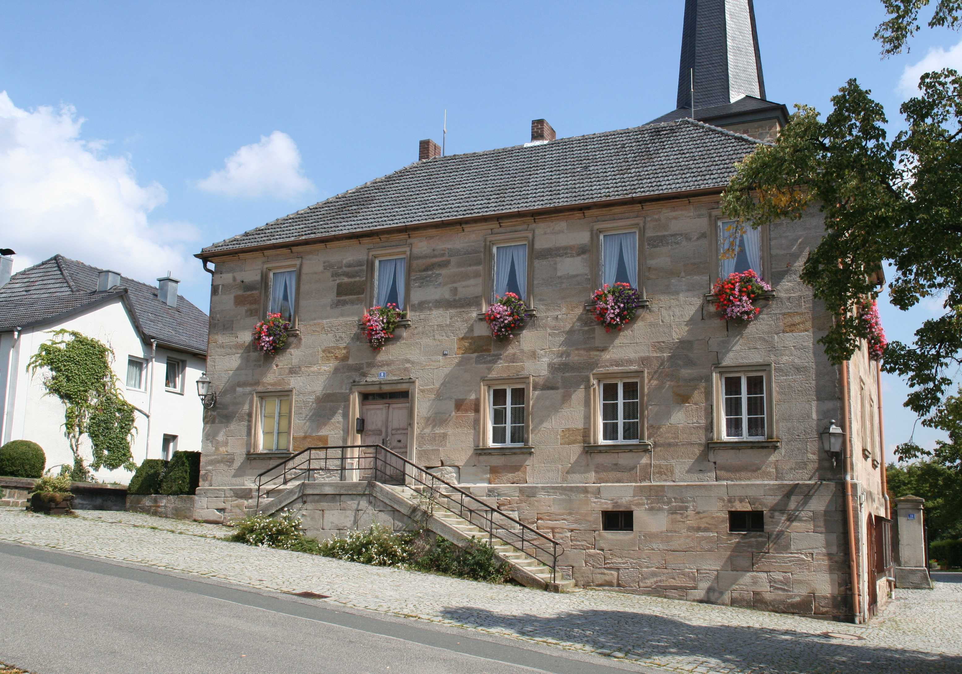 Ehemaliges Schulhaus Marktgraitz im Landkreis Lichtenfels in Bayern